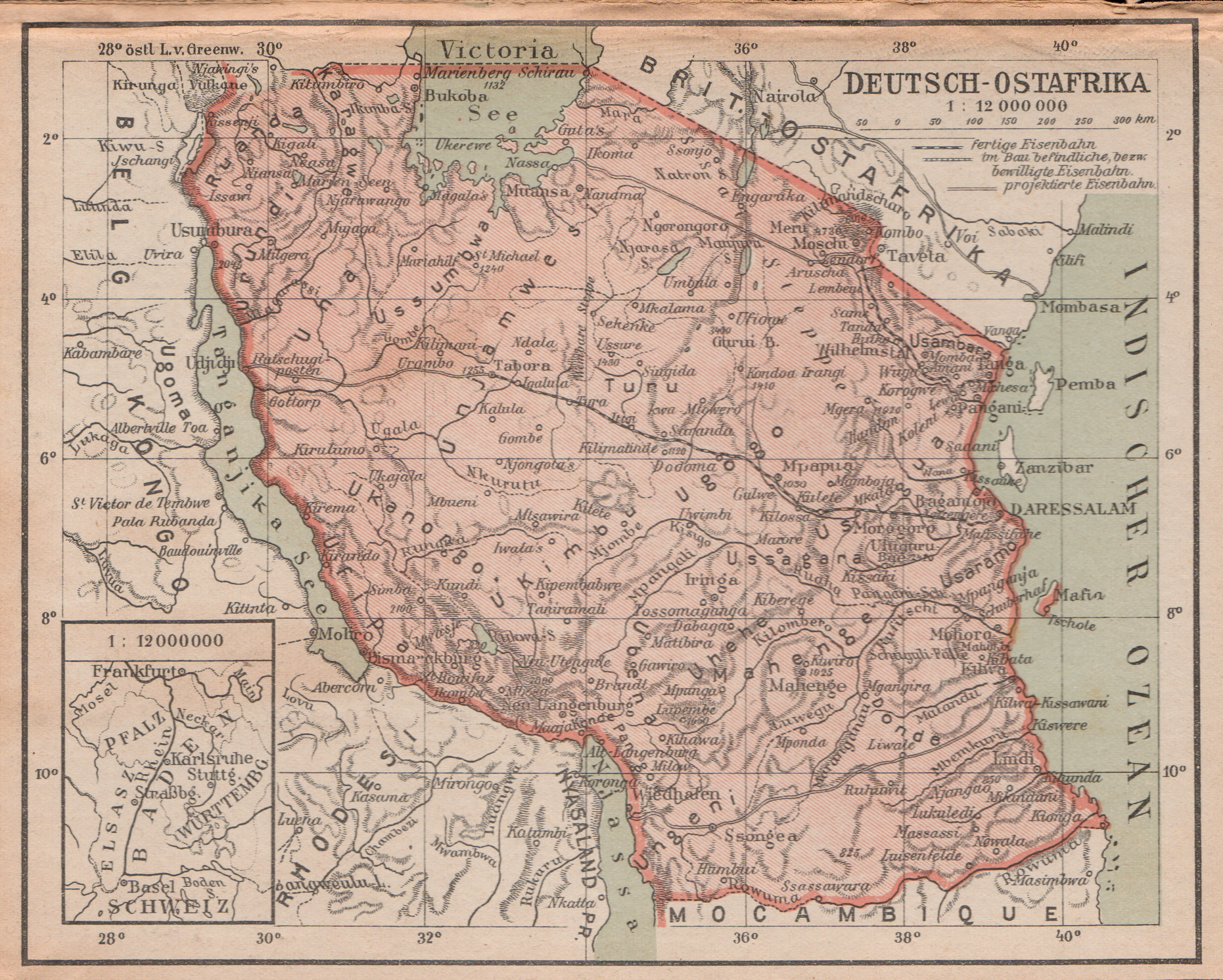 Deutsch-Ostafrika im Maßstab 1:12.000.000